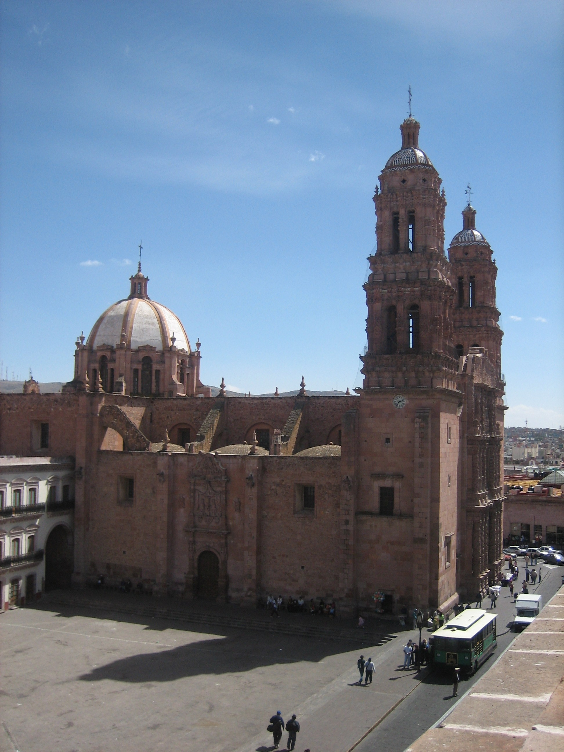 Cathedral Fotografía tomada desde el hotel imperial. trabajo propio Autor:Ricardo Doy el permiso para publicar